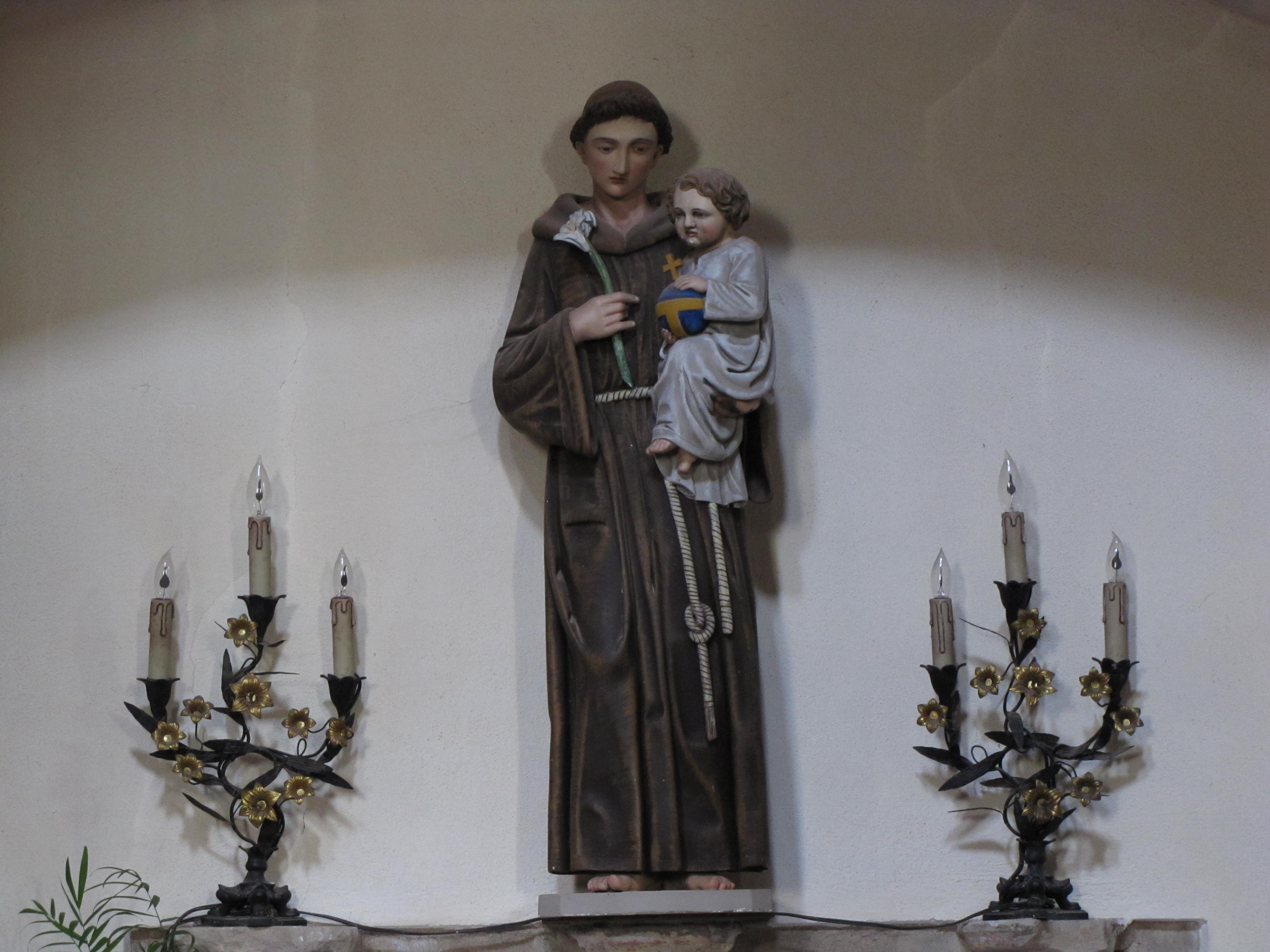 Alsace, Bas-Rhin, Altorf, Église abbatiale Saint-Cyriaque (PA00084581, IA67011108). Statue de Saint-Antoine de Padoue.